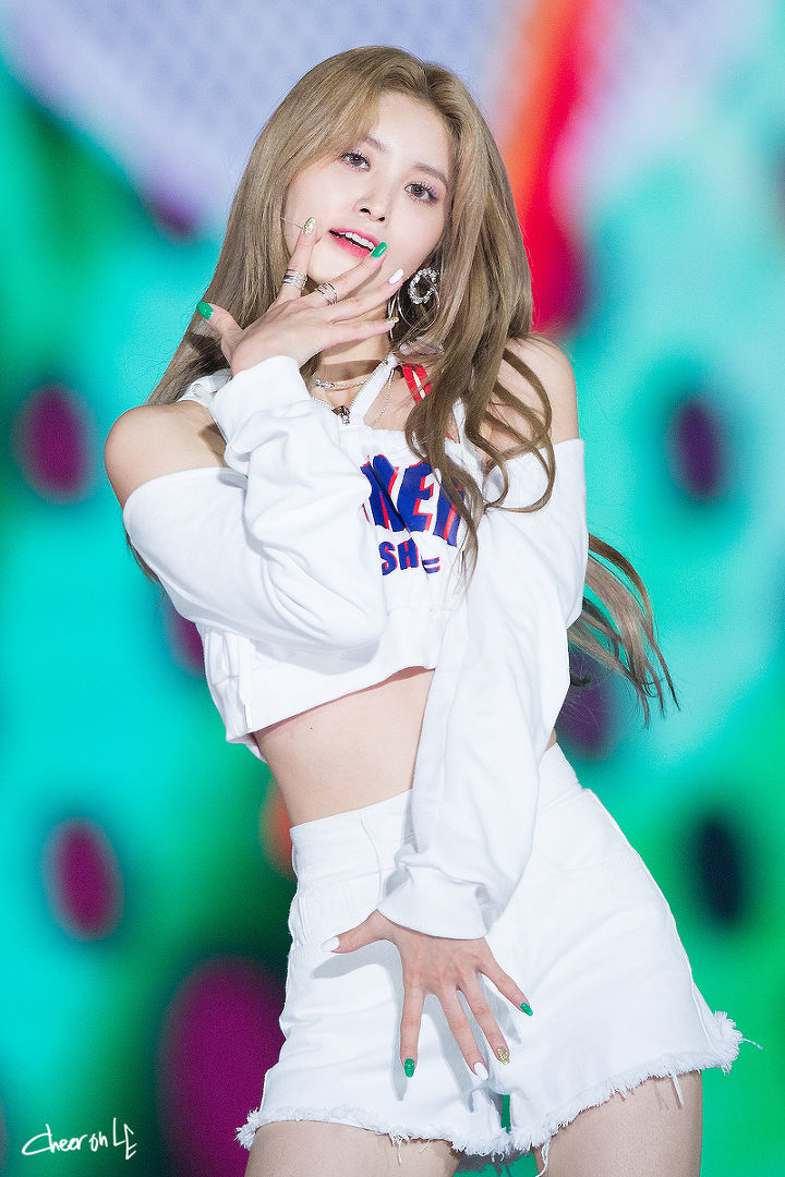 180802 2018 코리아 뮤직 페스티벌(KMF) 고척돔 EXID 정화 직찍 (1)